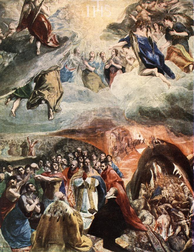 Esta obra, conocida como Adoración del nombre de Jesús, también es llamada El sueño de Felipe II o Alegoría de la Liga Santa